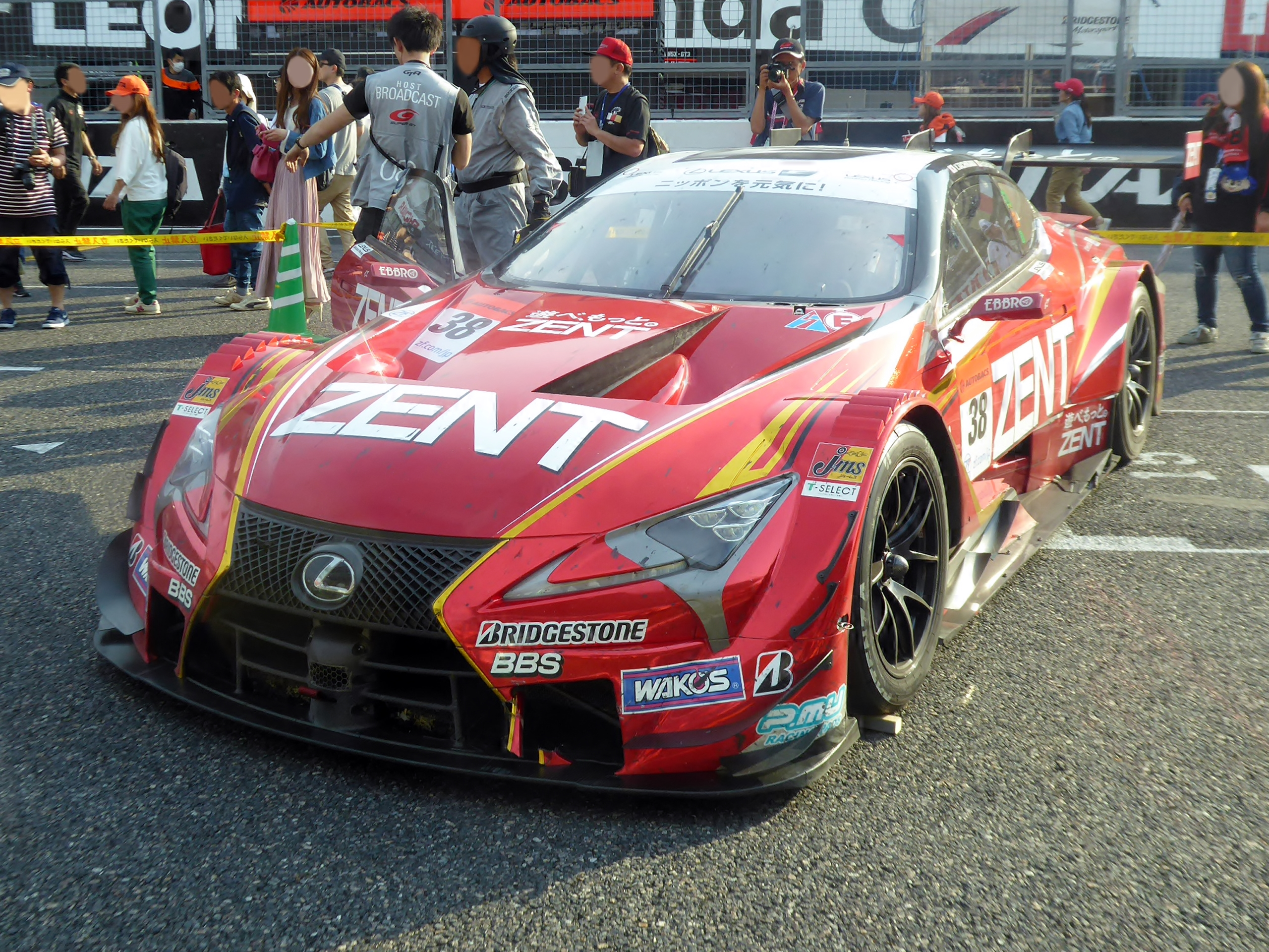 2019年鈴鹿GT300㎞終了後の38号車ZENT CERUMO LC500を撮影。